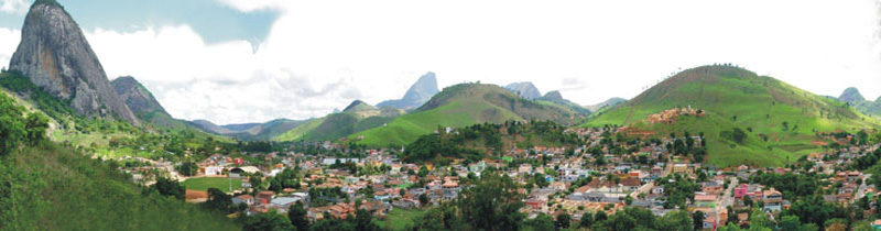 Vista de Itabirinha 2